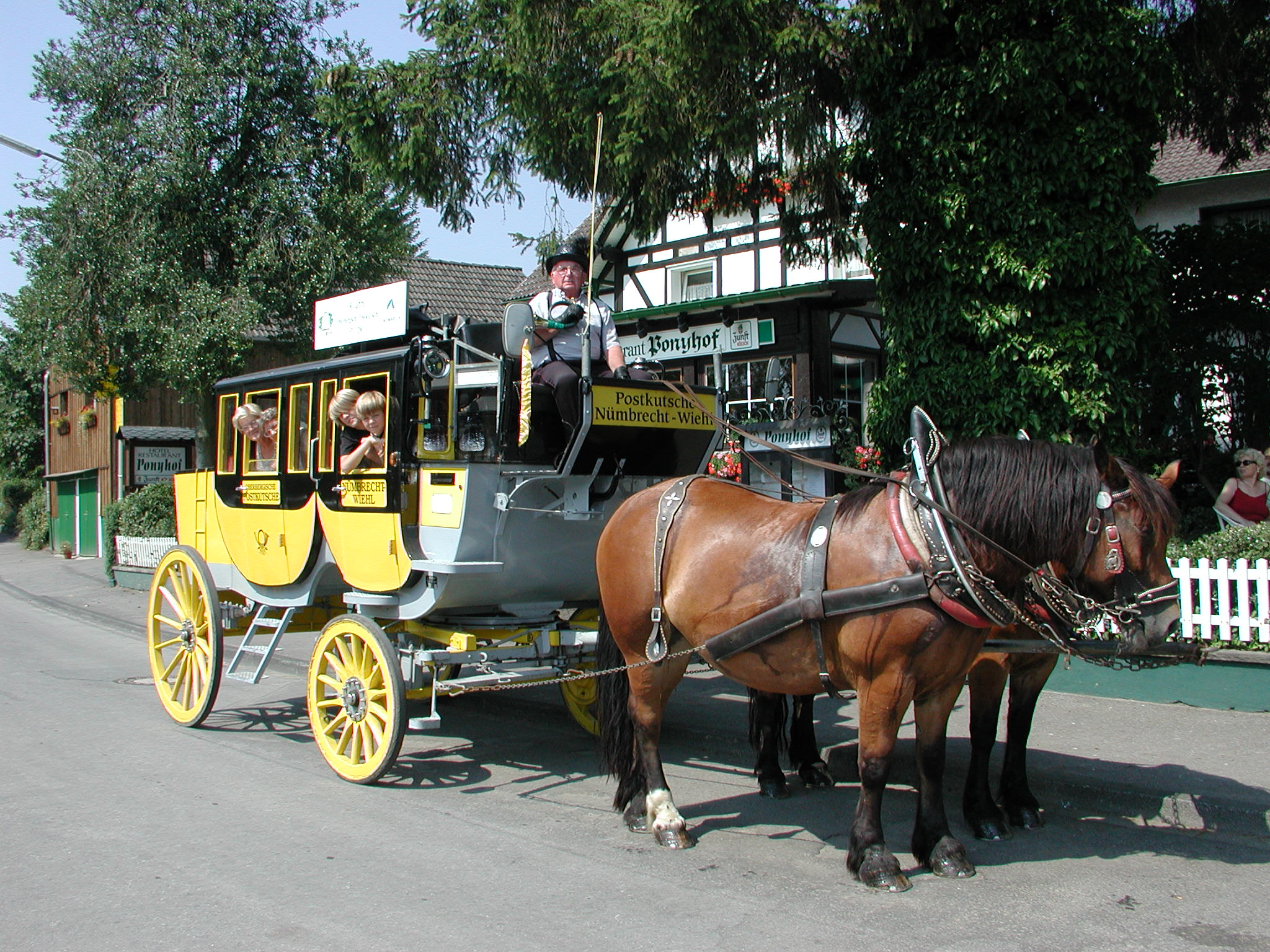 Oberbergische Postkutsche beim Stop.